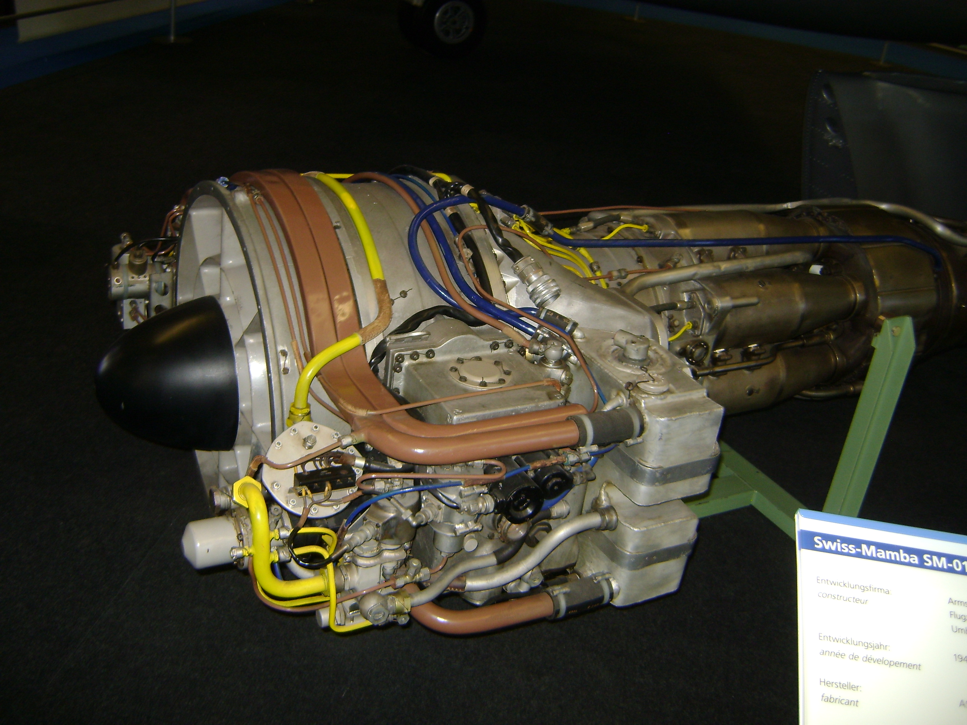 N-20 Triebwerk mit Auslass für nebenTriebwerke